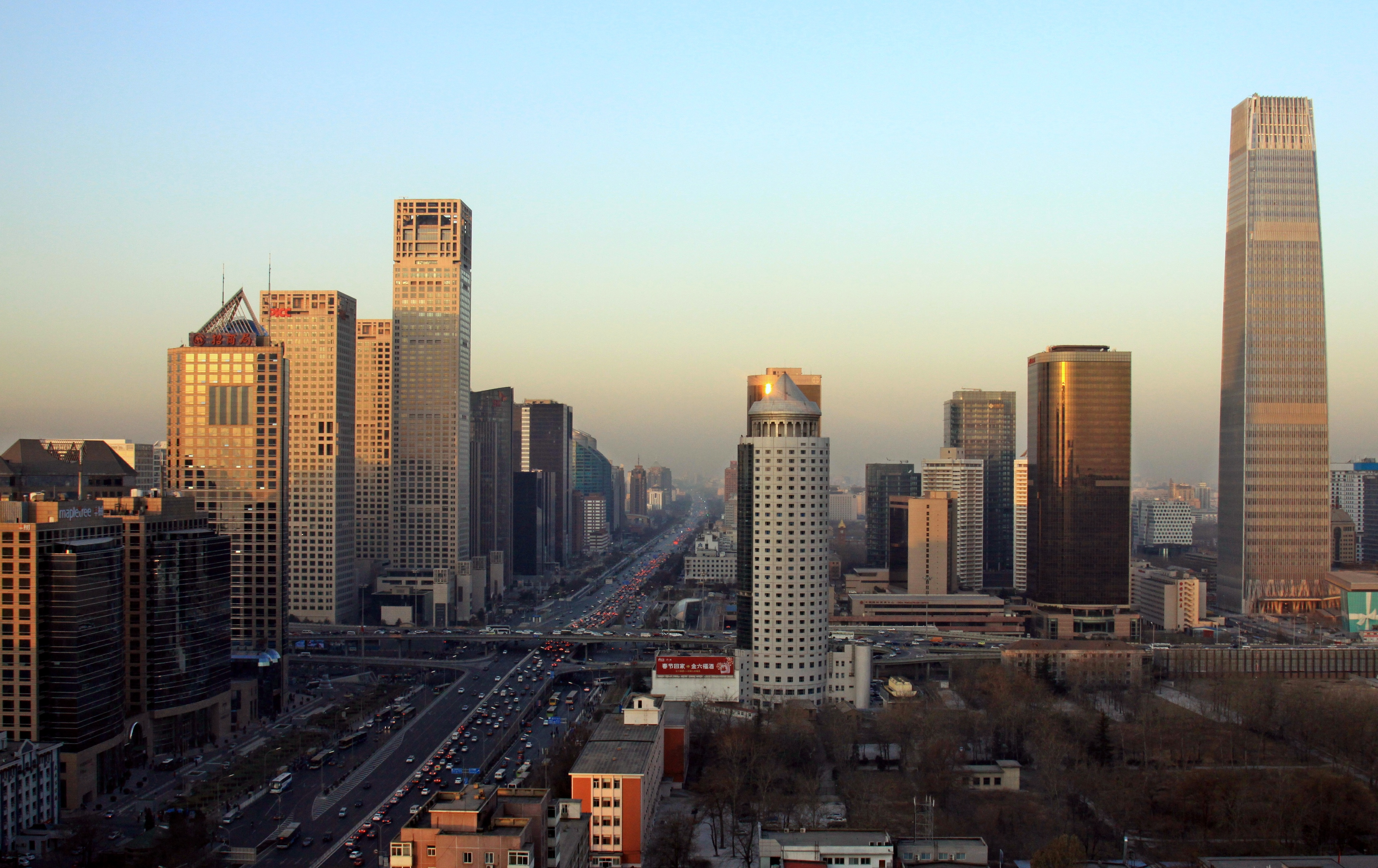 Beijing City